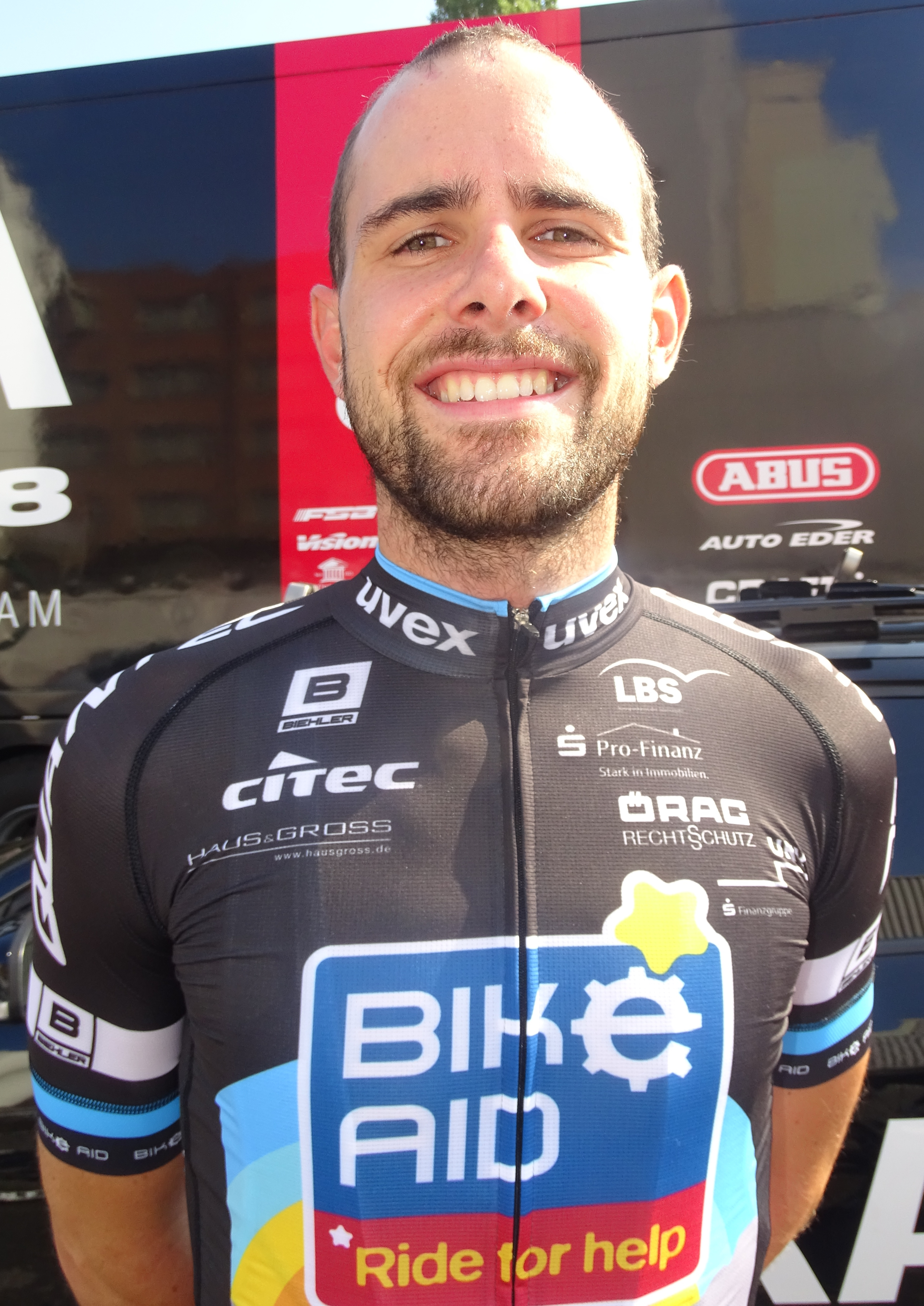 Reportage réalisé le dimanche 30 août à l'occasion du départ et de l'arrivée de la Coupe Sels 2015 à Merksem (Anvers), Belgique.